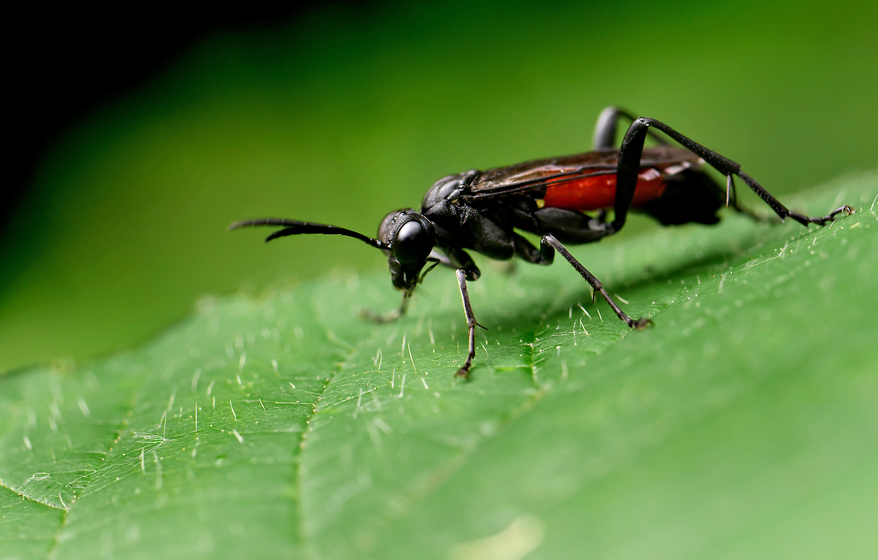 Panasonic GX7 + Leica DG Macro-Elmarit 45mm F2.8 ASPH OIS